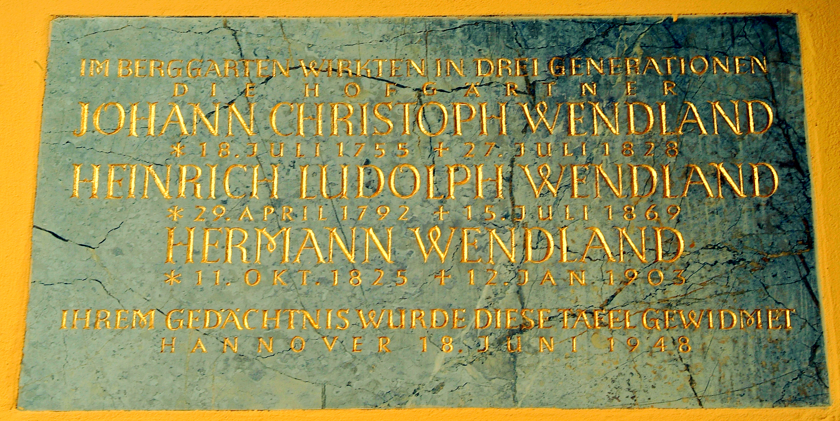 Gedenktafel am Bibliothekspavillon vor dem Berggarten in Hannover: "Im Berggarten wirkten in drei Generationen die Hofgärtner Johann Christoph Wendland * 18. Juli 1755 + 27. Juli 1828 / Heinrich Ludolph Wendland * 29. April 1792 + 12. Jan. 1903 / Hermann Wendland * 11.Okt. 1825 + 12. Jan. 1903 / Ihrem Gedächtnis wurde diese Tafel gewidmet / Hannover 18. Juni 1948"